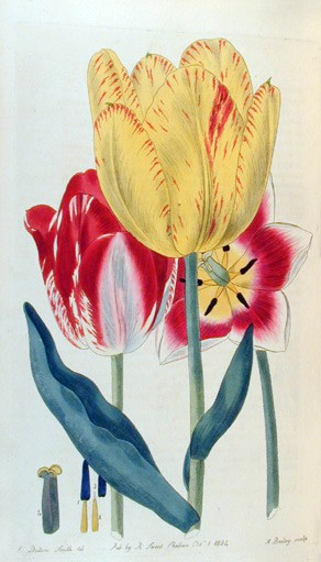 Tulips drawing by Robert Sweet